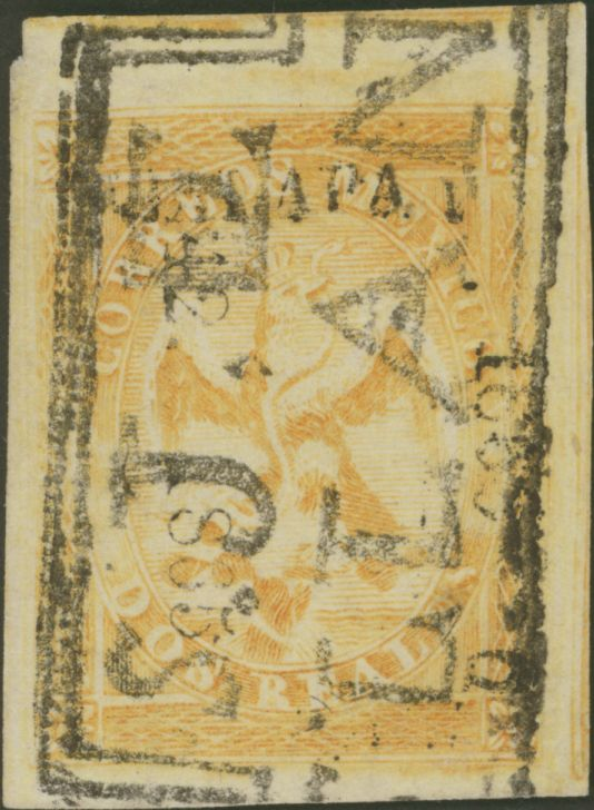 Mexico 1864 Eagle, Jalapa district invoice 42 1865, sub-consignment 6 to San Juan de los Llanos